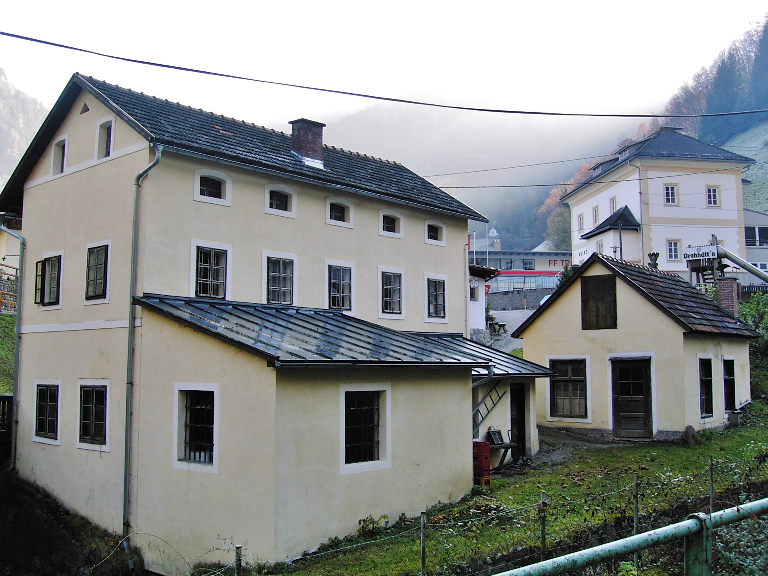 Ternberg Messerproduktionsstätte Kienbergstraße 1